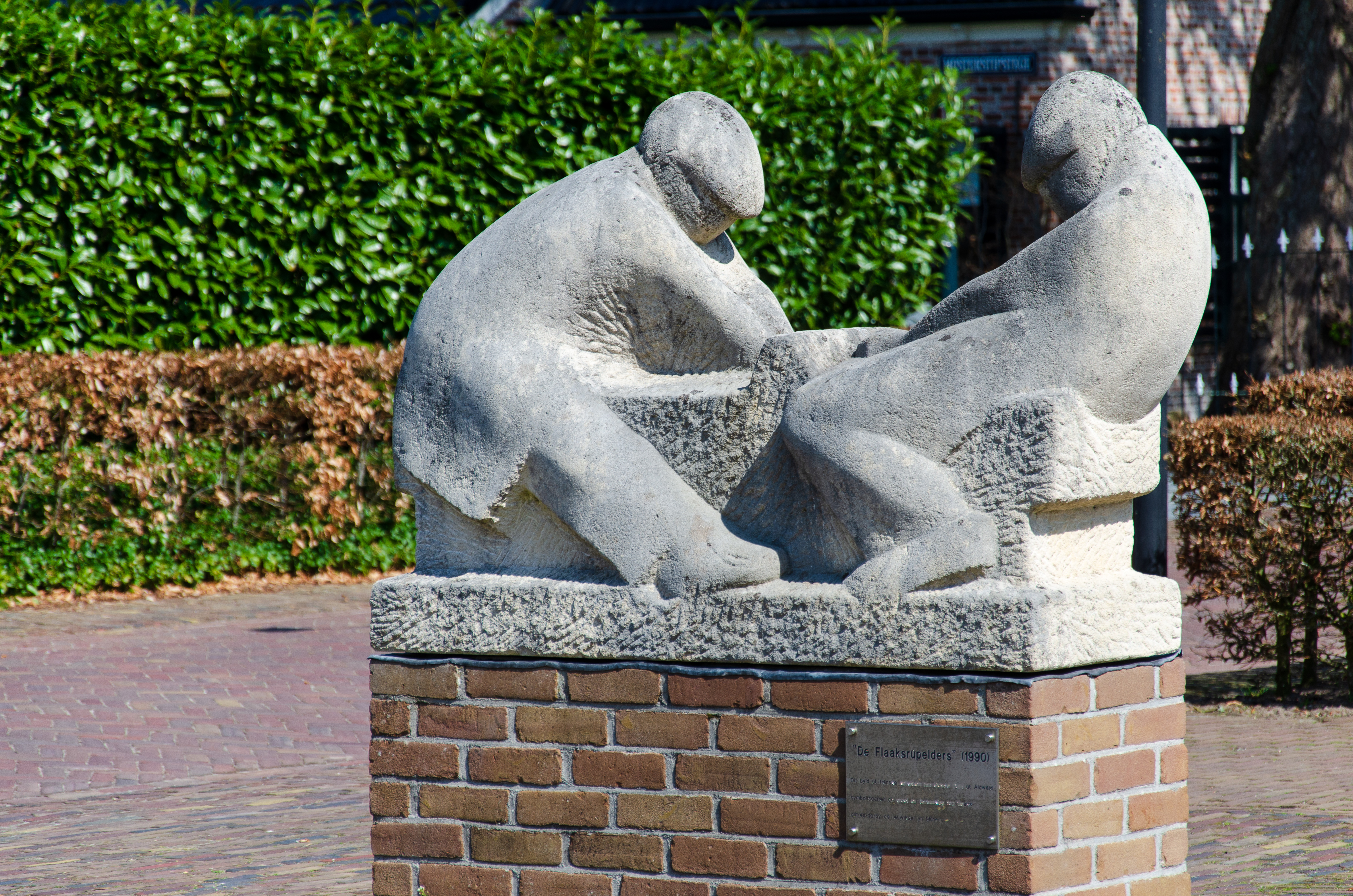 Beeld van Gosse Dam in Molenend (Mûnein): De Flaaksrûpelders (1990). Dit beeld van Franse kalksteen van Gosse Dam uit Oudwoude symboliseert de groei en de verwerking van vlas rond 1900 in Molenend.